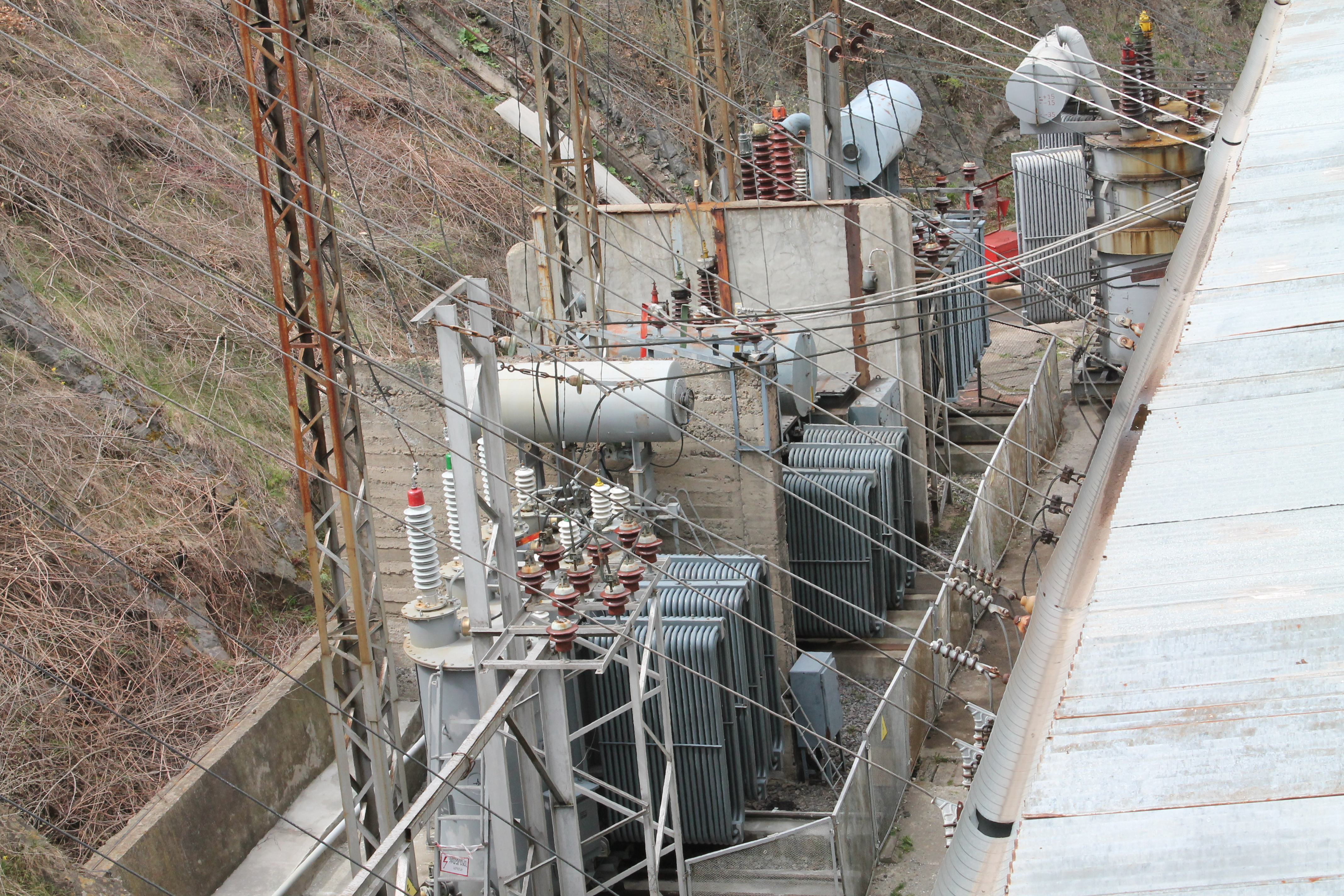 Трансформаторы Дзорагетской ГЭС